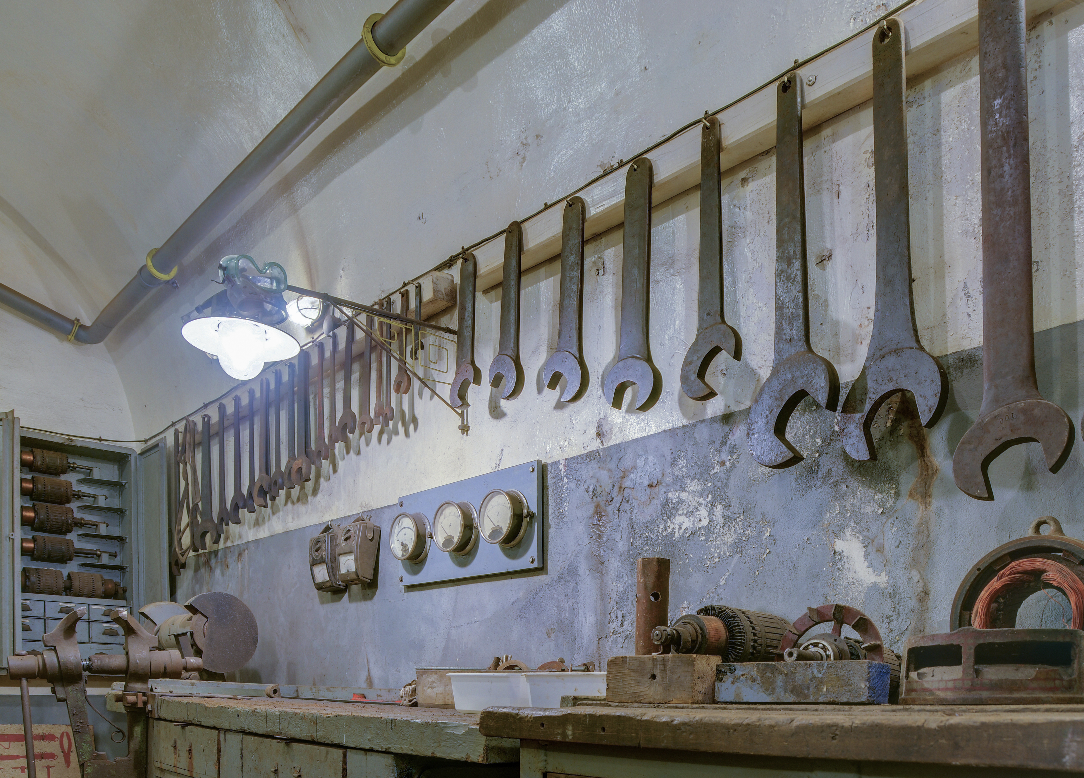 Dans l'usine : atelier de réparation électro-mécanique. (HDR).